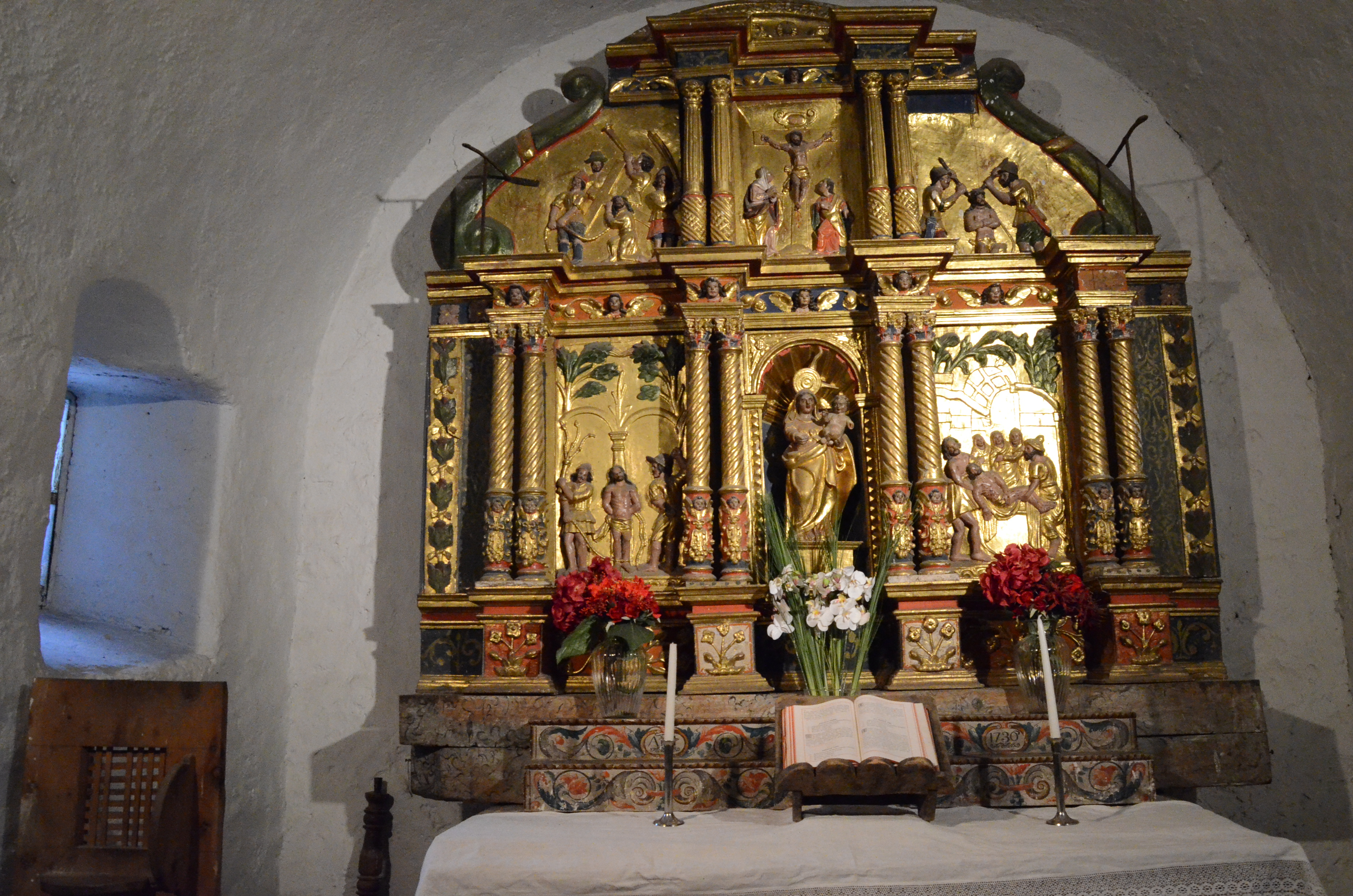 Església de Sant Martí de la Cortinada